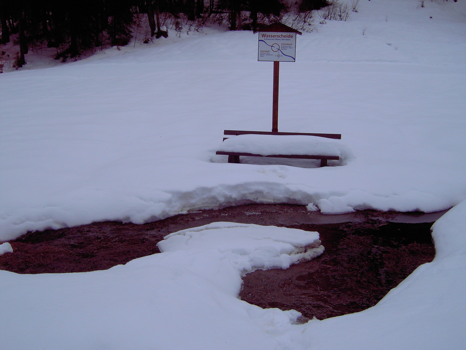 Wasserscheide am Beispiel der Starzlach im Allgau